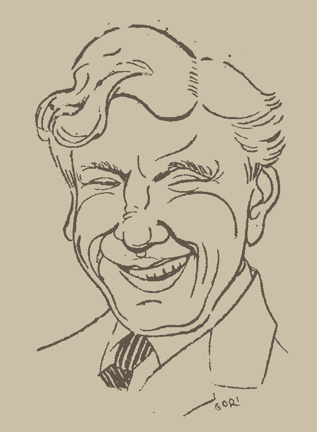 Ants Lauter